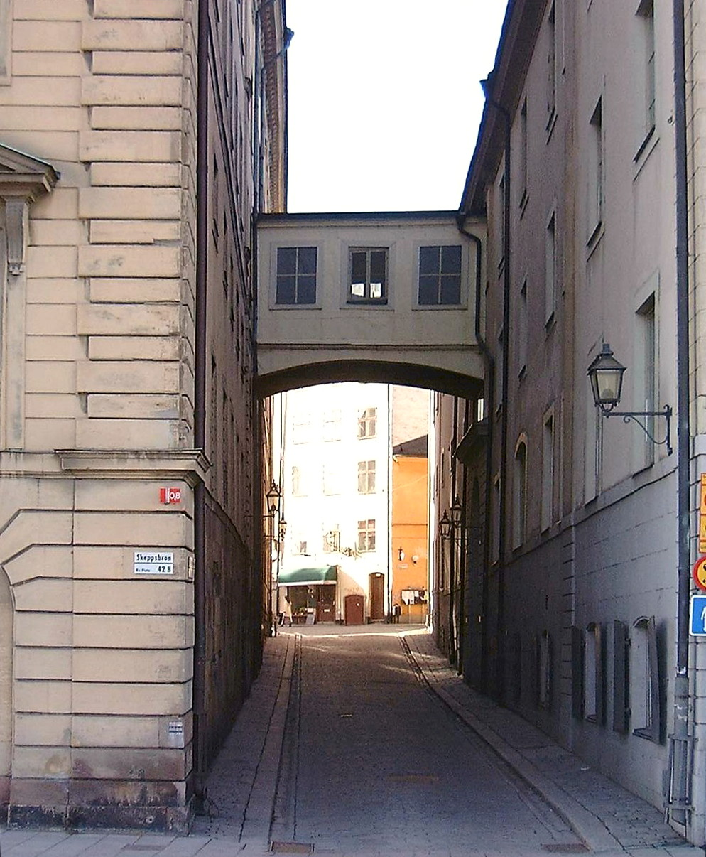 Norra Bankogrand, Gamla stan, Stockholm.